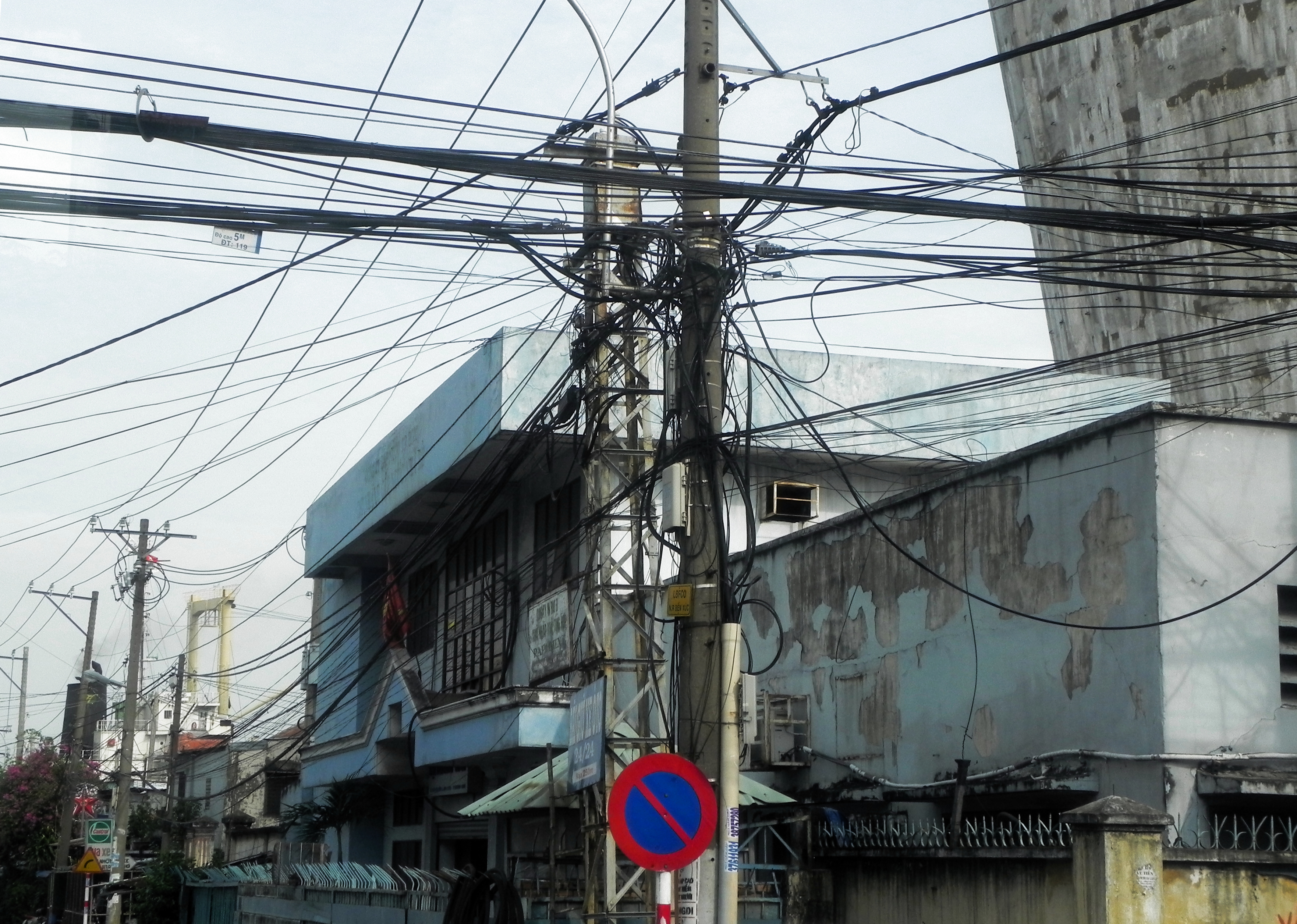 Kommunikations- und Stromleitungen, Elektrizitätsversorgung in Ho Chi Minh Stadt